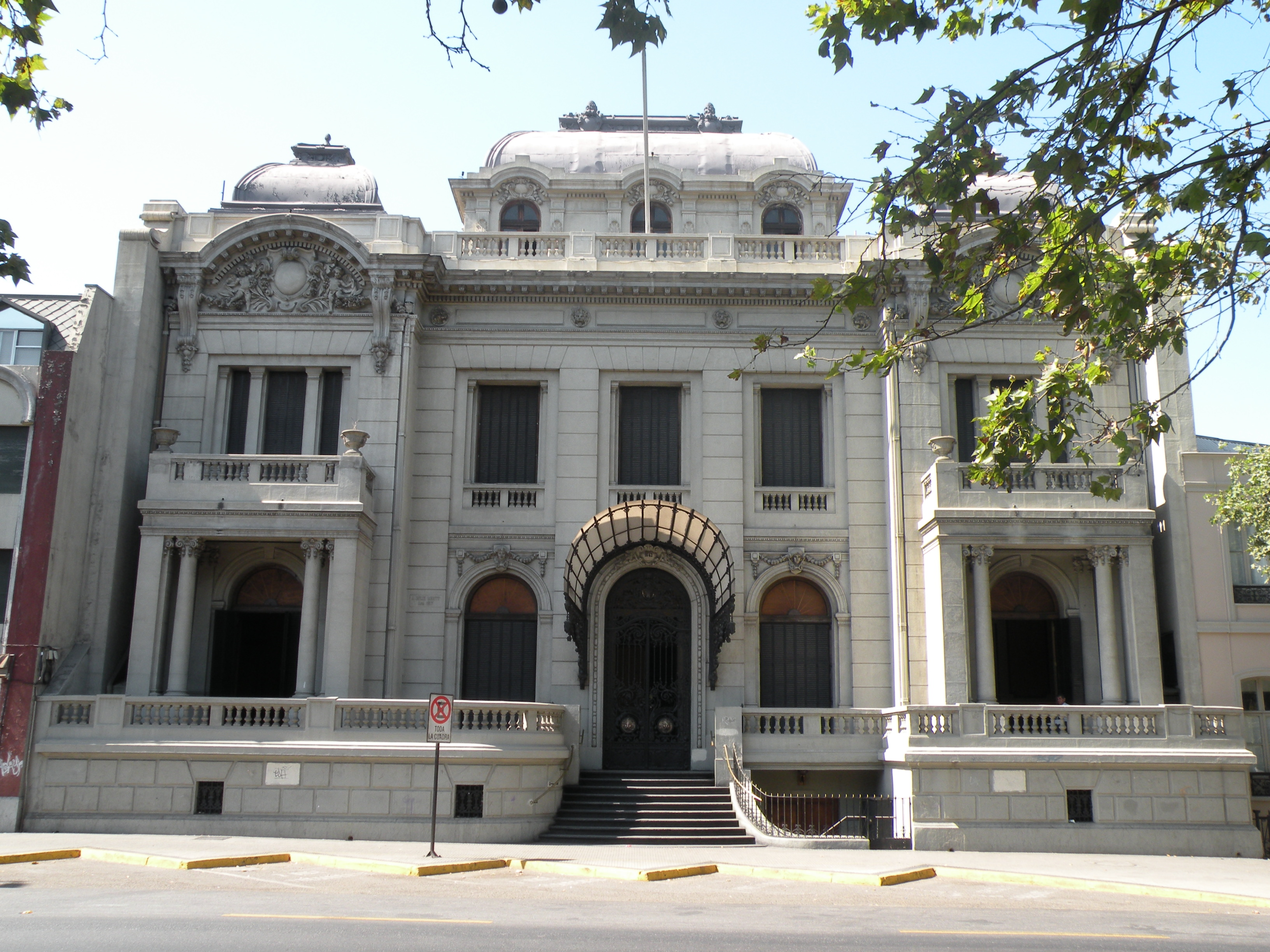 Palacio Ariztía — actual sede de la Camara de Diputados en Santiago.